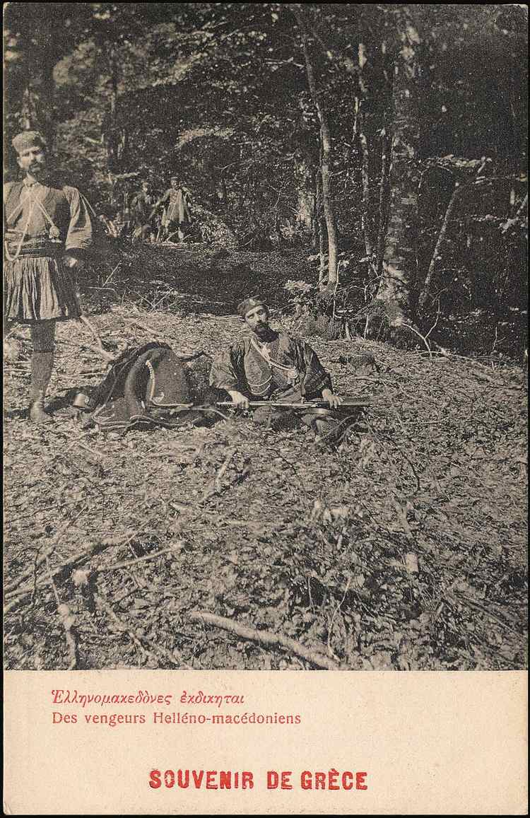 Гръцките андартски капитани Константинос Гарефис и Костас Акритас (Константинос Мазаракис)